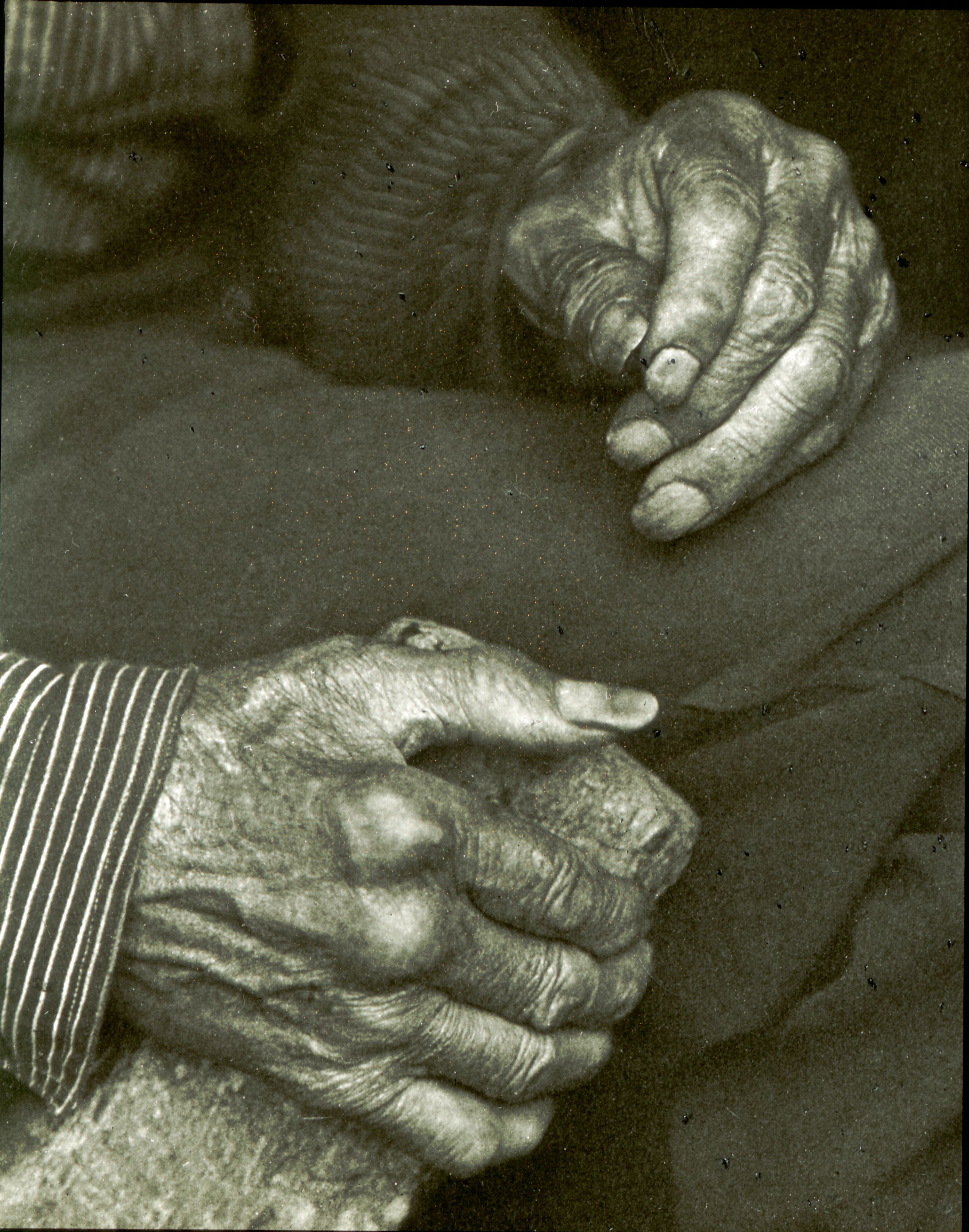 Laborer's hands